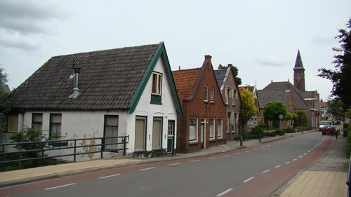 Nedersaksies: Lutjenbrook